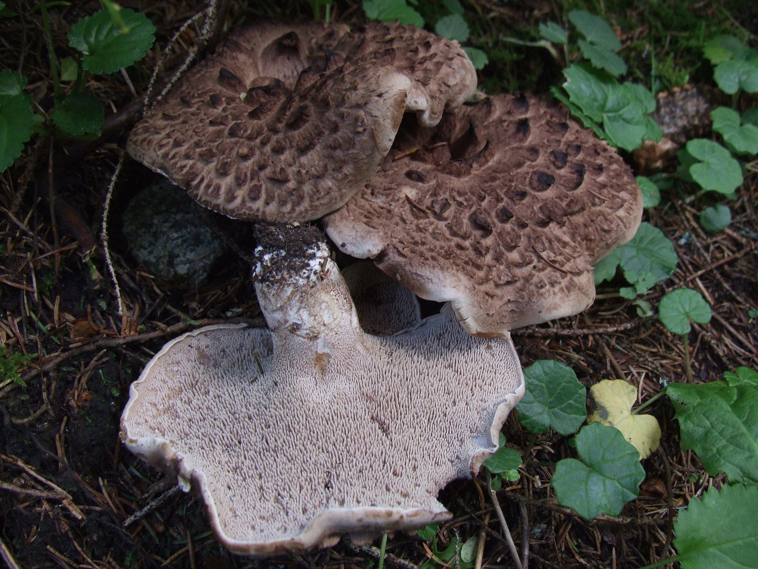 Sarcodon imbricatus